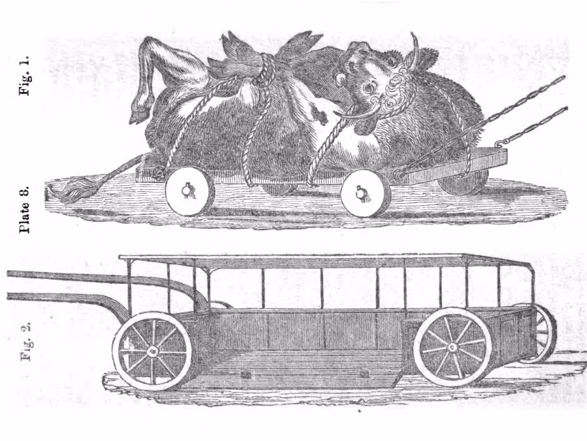 איור מתוך הספר Fragments in defence of animals and essays on morals soul and future state